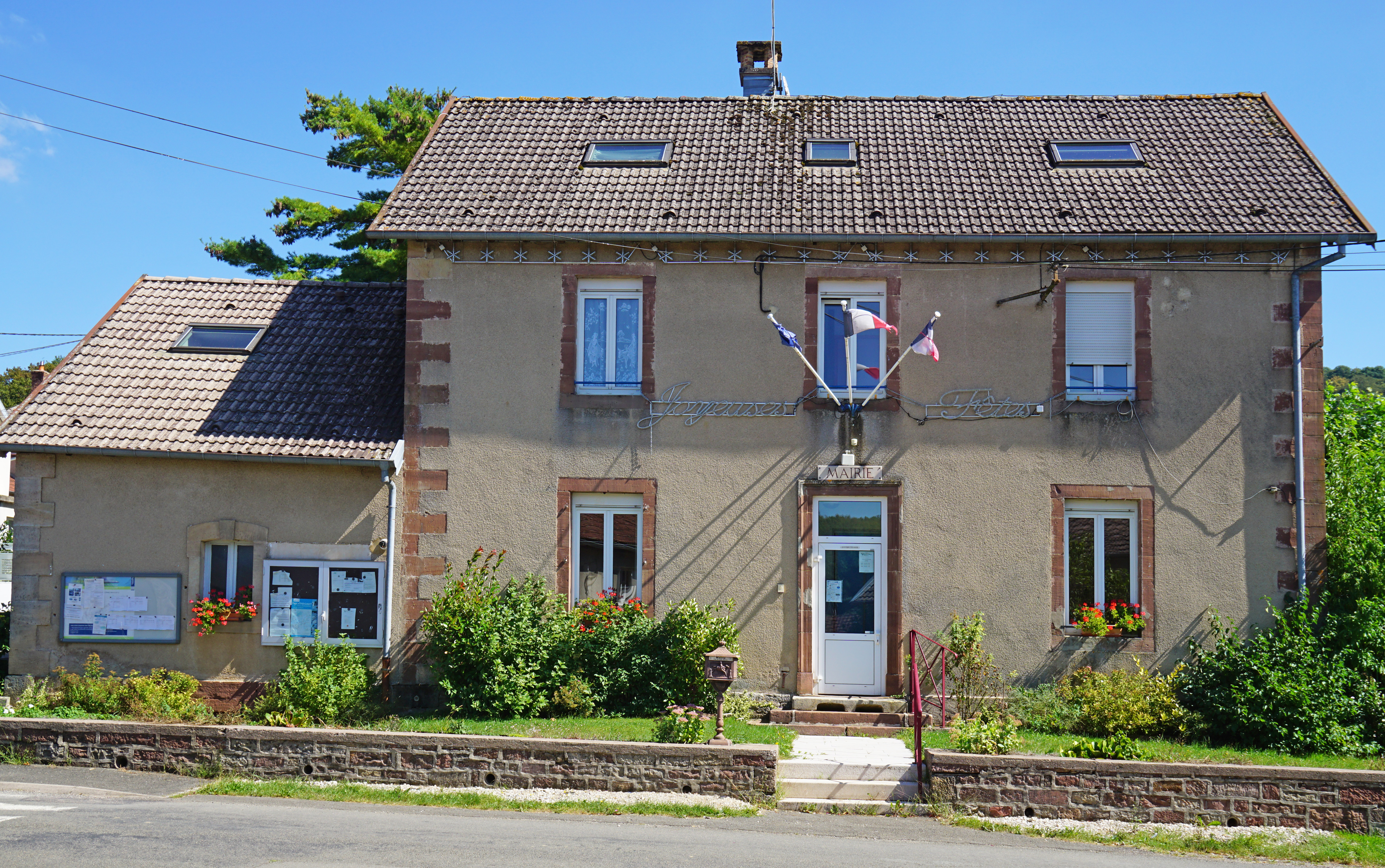 Mairie de Villers-sur-Saulnot.